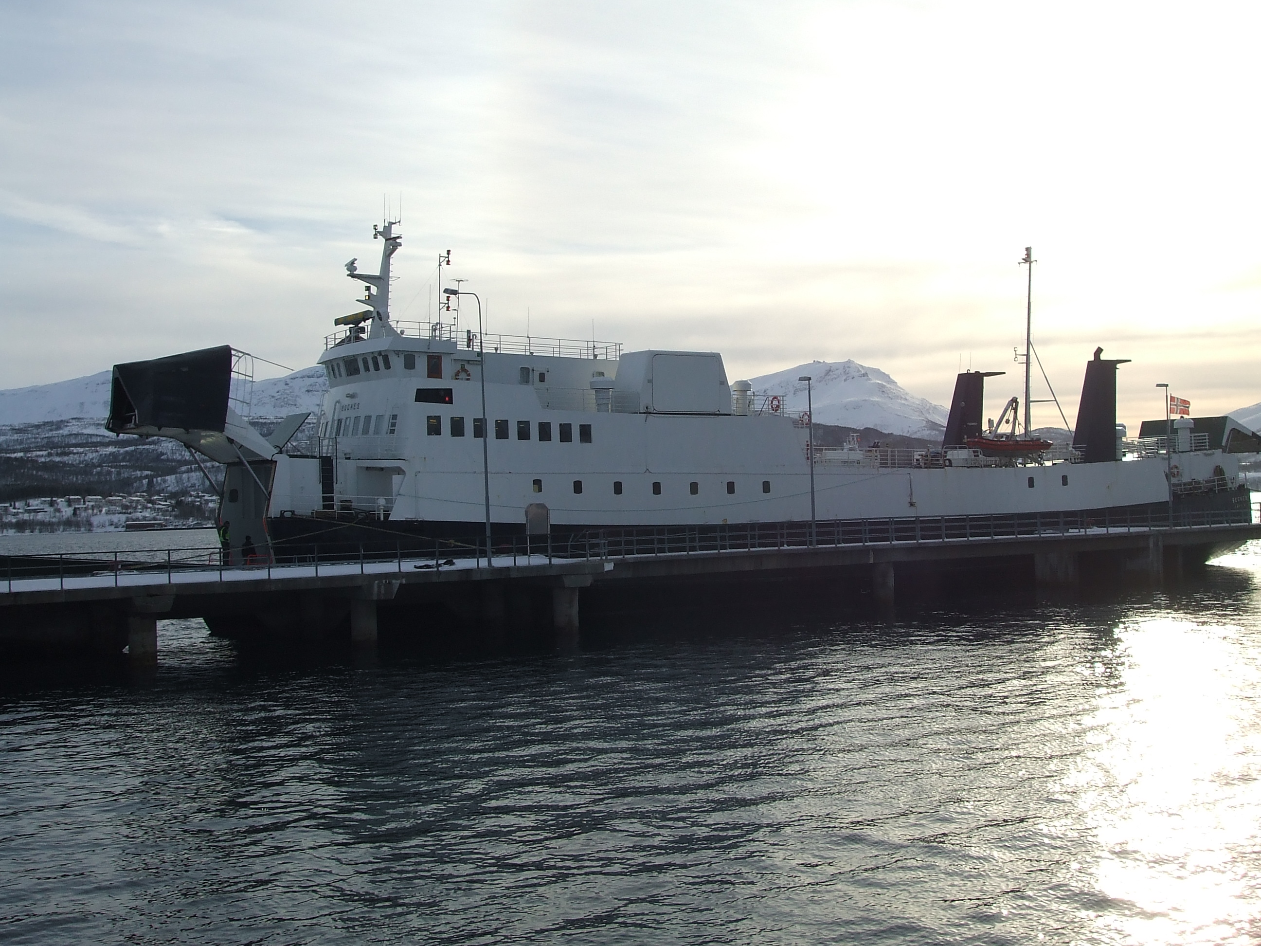 M/S Bognes til kai i Sørreisa,04. mars 2007.